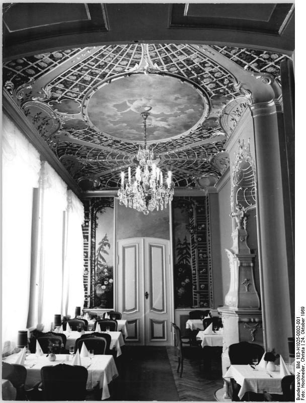 Berlin, Ermeler-Haus, Gaststätte, Rosenzimmer Zentralbild Hochneder-24-10-69 Berlin: Ermeler-Haus, Altberliner Kleinod am Märkischen Ufer - Zu Füßen der 21 geschossigen Wohnhochhäuser ist ein Stück Alt-Berlin, das Ermeler-Haus mit Weinrestaurant, Cafe und Raabe-Diele, wiedererstanden. Das noch vor drei Jahren in der Breiten Straße stehende Gebäude mußte dem Neuaufbau des Stadtzentrums weichen. Zuvor bargen Restauratoren alle Kostbarkeiten des alten Patrizierhauses, um sie dann am neuen Standort, dem Märkischen Ufer, restauriert zu "montieren". Seit dem 20.Jahrestag der DDR ist das neue gastronomische Schmückstück unserer Hauptstadt seinen Gästen geöffnet. Im Rosenzimmer wurden die Originaldecken des Ermeler-Hauses wieder angebracht. Das Zimmer stellte eine mit Heckenrosen bewachsene Laube dar.